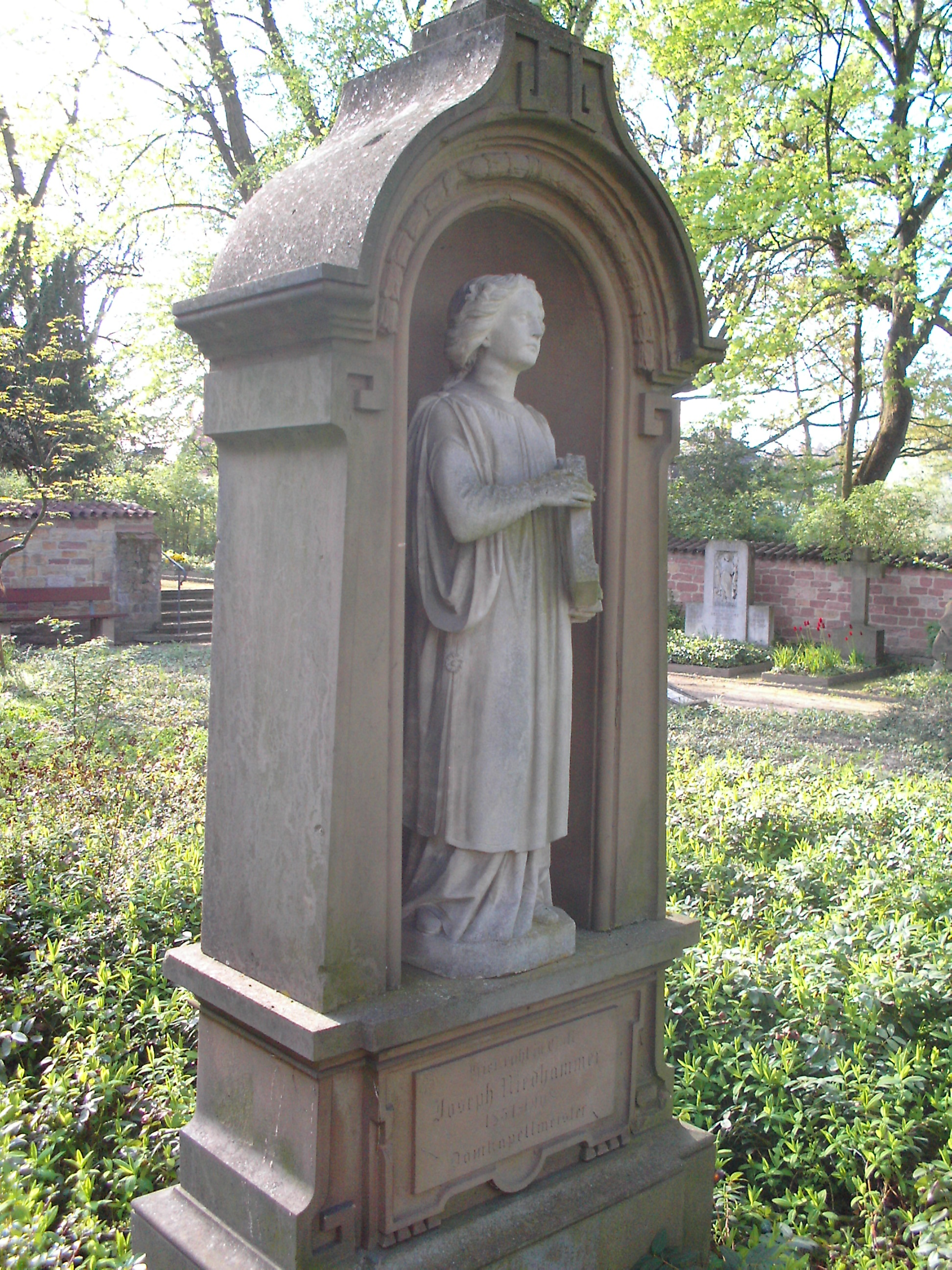 Joseph Niedhammer Komponist, Domkapellmeister, Speyer, Grabstein